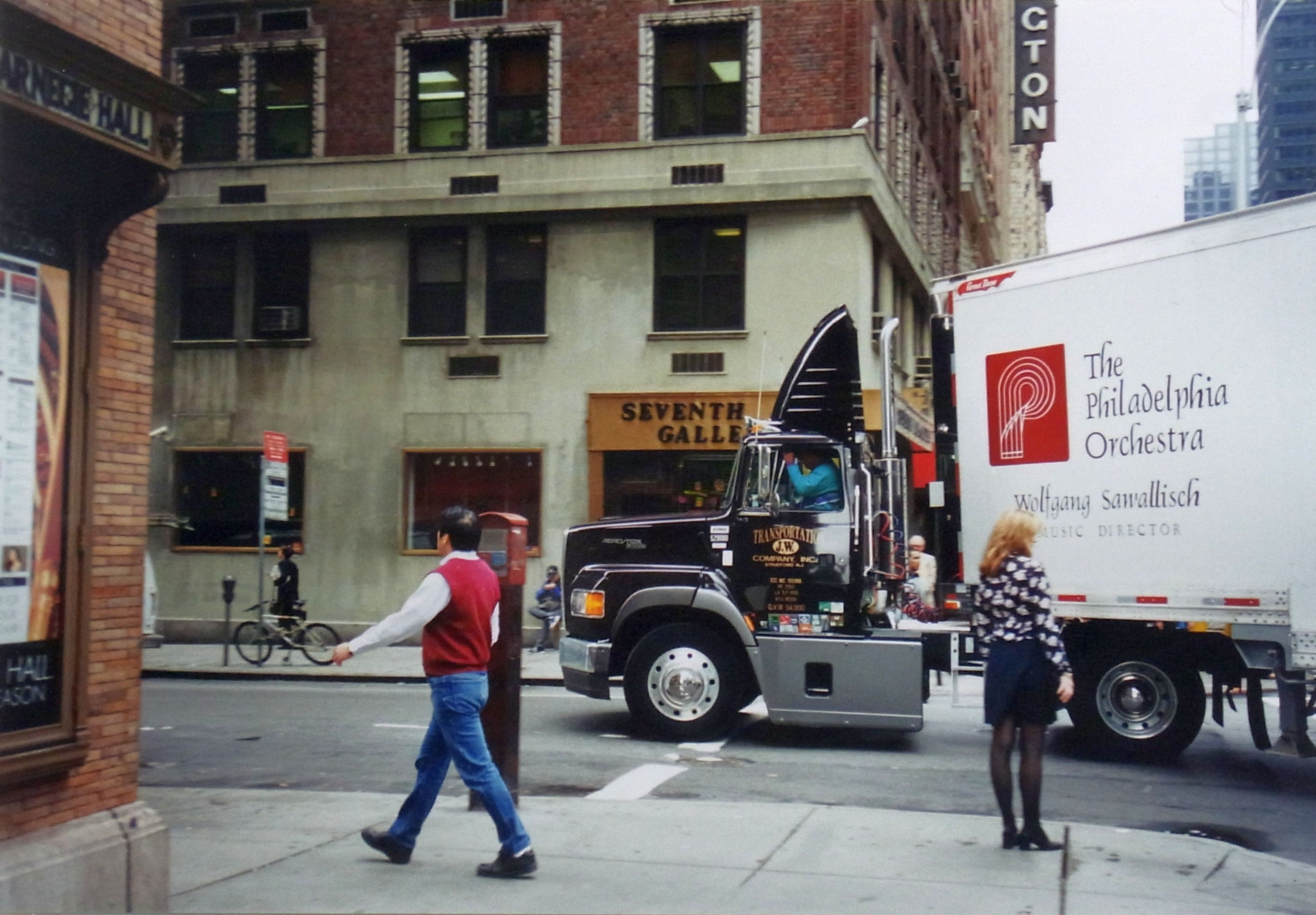 Trucker des Philadelphia-Orch. vor der Carnegie-Hall - wg. Konzert am 26.9.1995